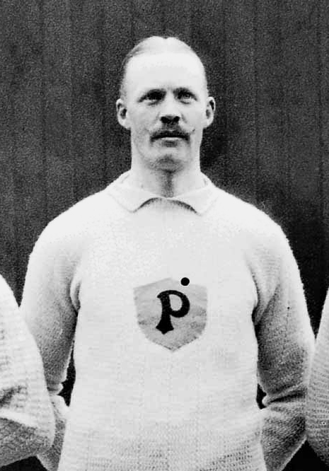 August Gustafsson